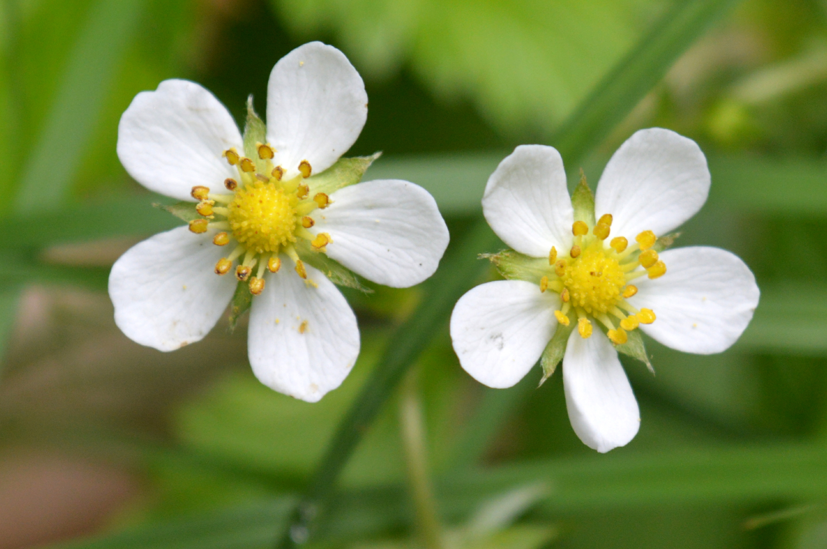 LSG Waldgürtel zwischen Salzgitter-Osterlinde und Salzgitter-Bad (Salzgitterscher Höhenzug) - Walderdbeere